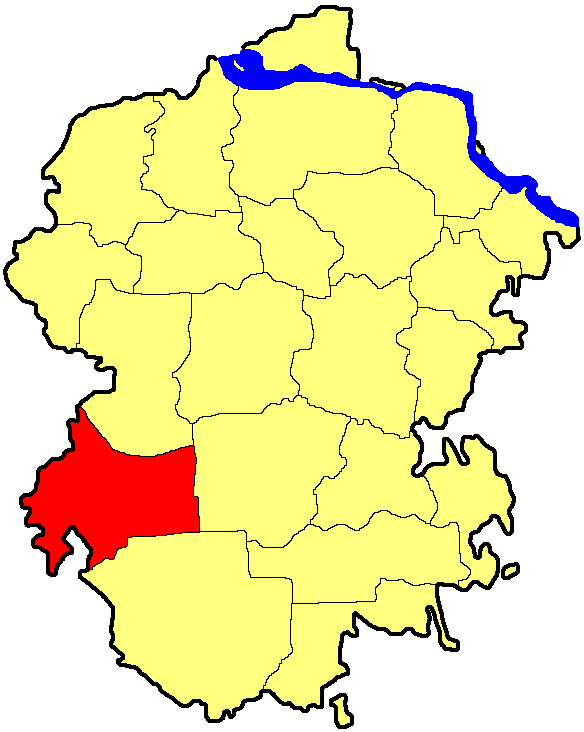 Поріцький район Чувашії